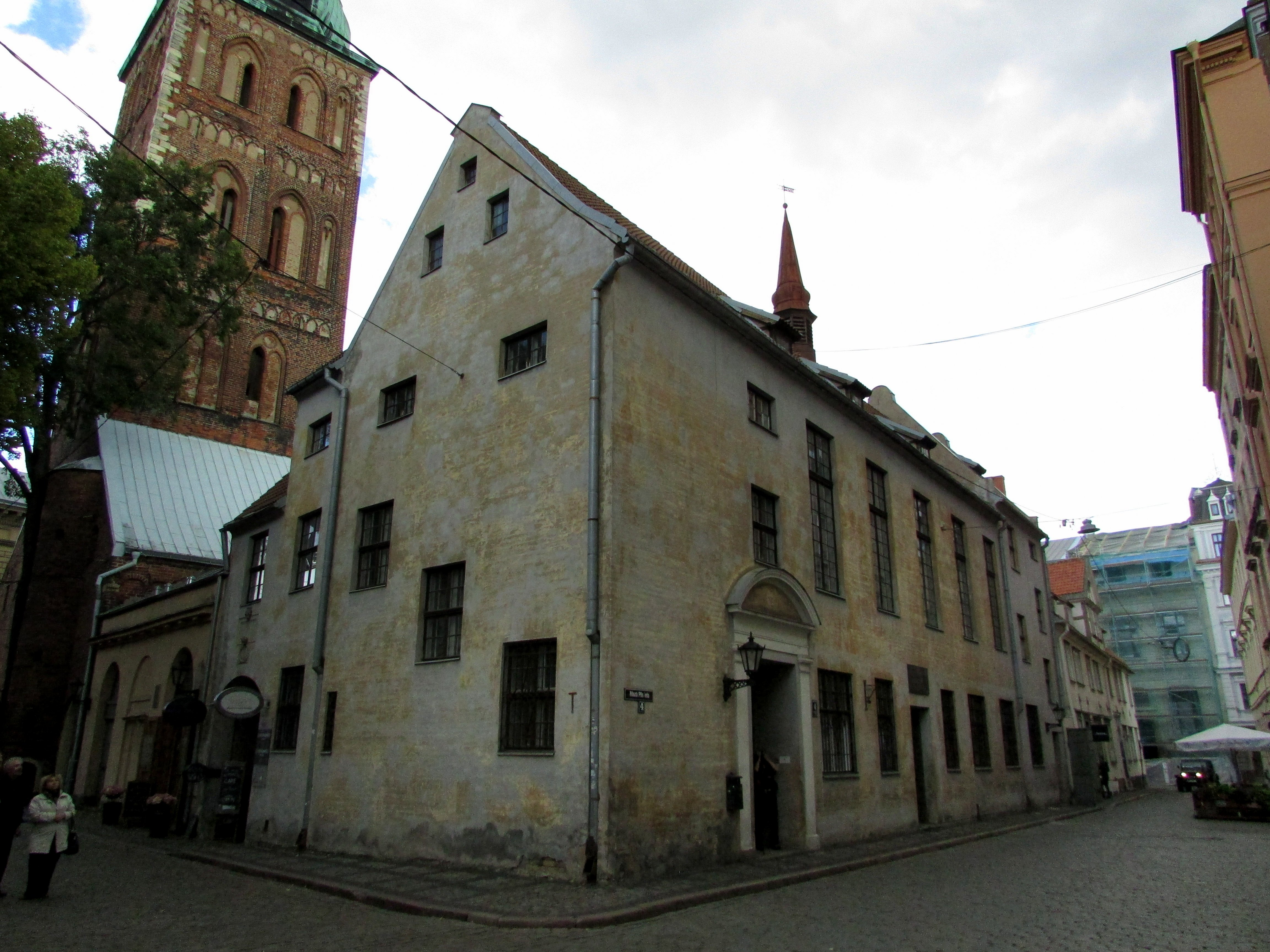 Sv. Jēkaba katoļu baznīca ar ēku kompleksu, Rīga, Jēkaba iela 9, Mazā Pils iela 4, Mazā Pils iela 6